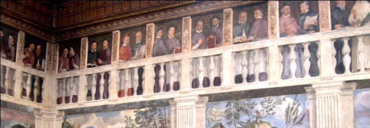 Domenico Brusazorzi, i Vescovi di Verona. Palazzo del Vescovado di Verona